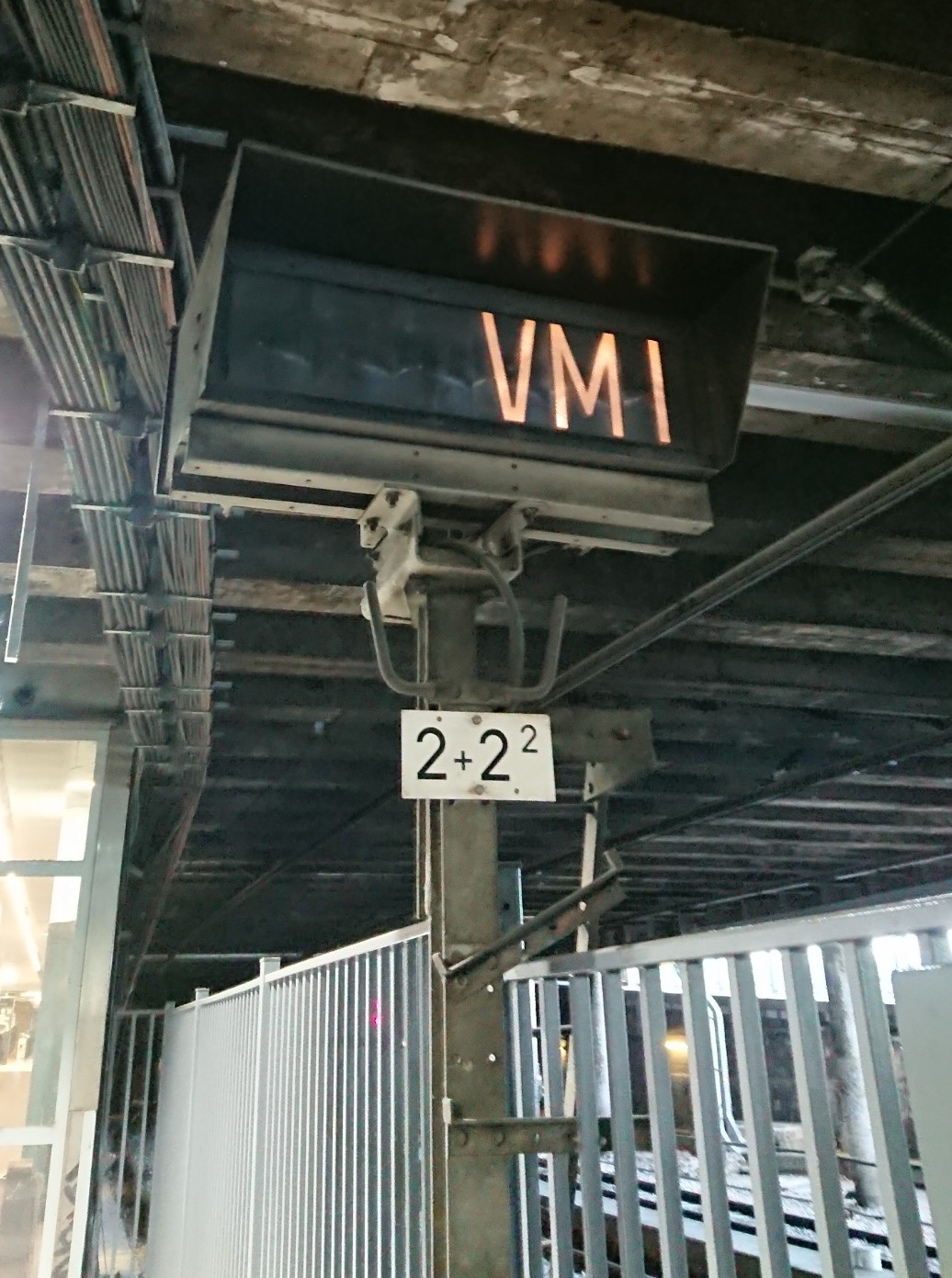 Direction branche "Vallée de Montmorency-Invalides" (VMI, comme sur la photo), ou "Transversale Rive-Gauche" (TRG).